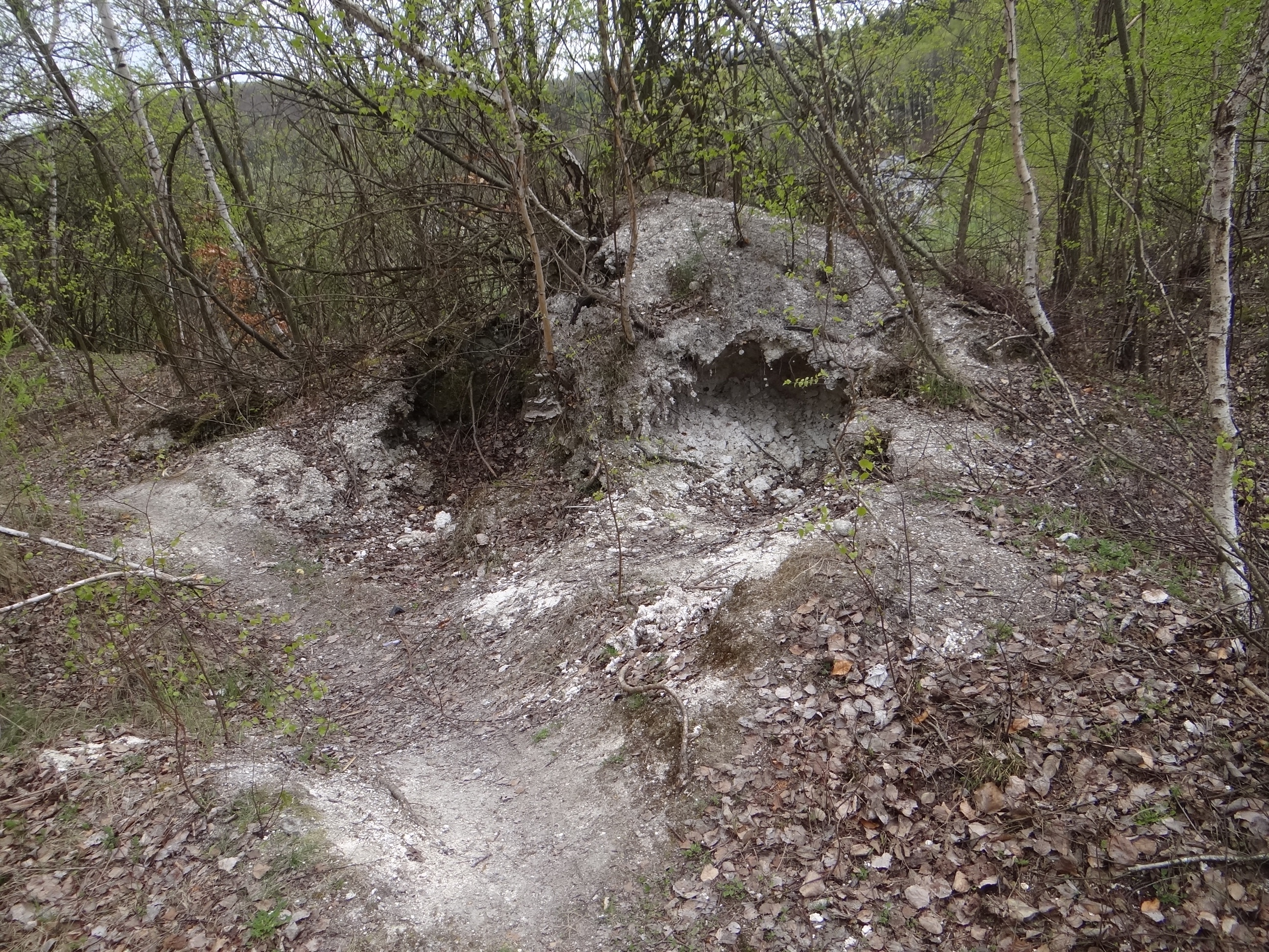 Bogucianka